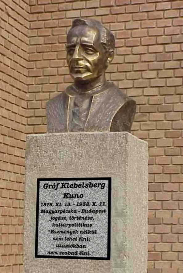 Klebelsbert Kunó Pécskai mellszobra.